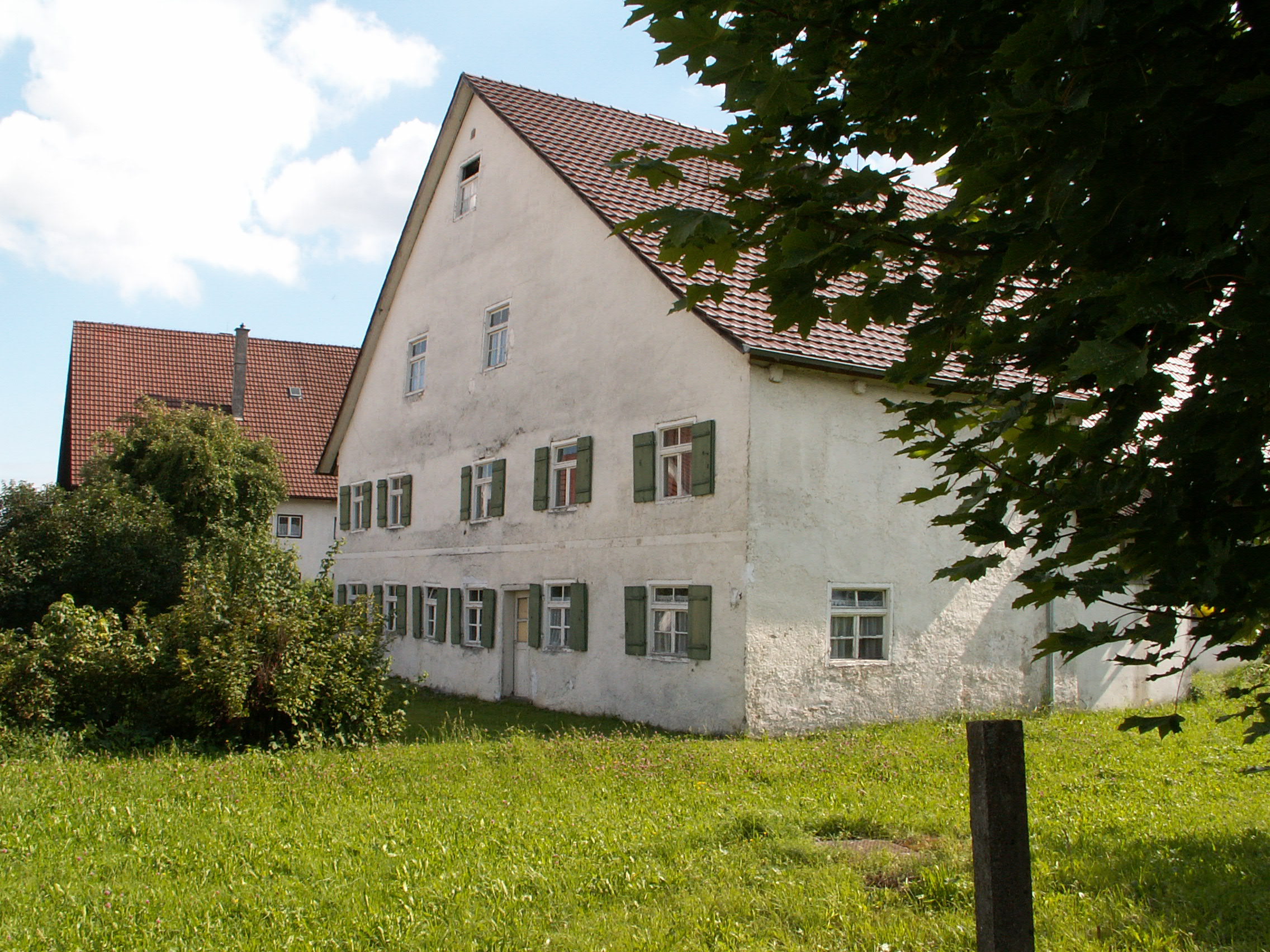 Hauptstr. 8 in Egg an der Günz